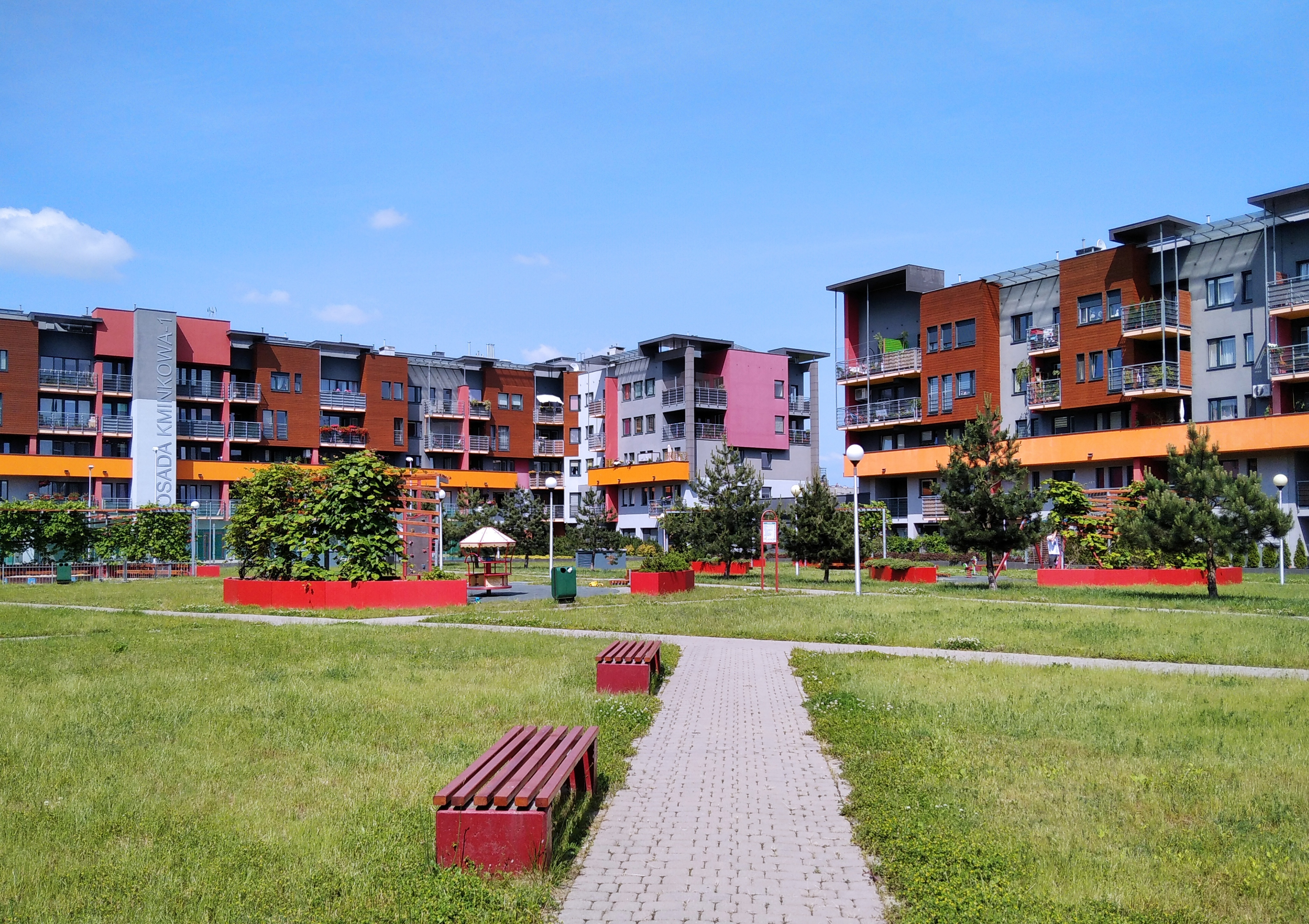 Podwórko wewnątrz kwartału ulic Waniliowej, Cynamonowej i Szałwiowej na wrocławskim osiedlu Lipa Piotrowska